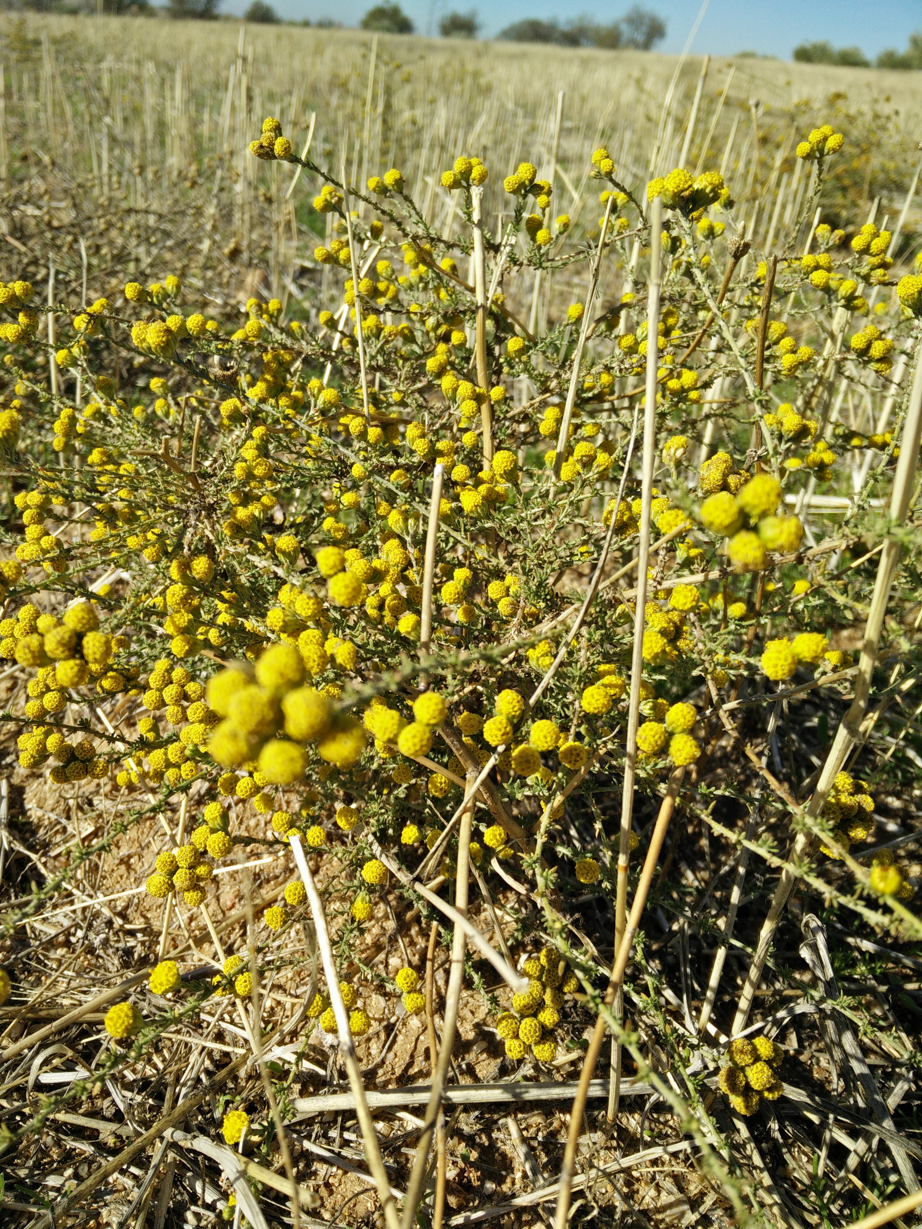 Tanacetum microphyllum en campo de trigo